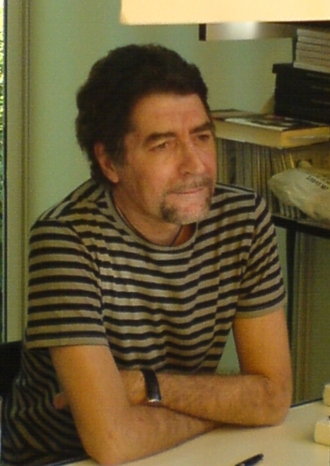 Joaquín Sabina firmando su último libro en la Feria del Libro de Madrid de 2007. Fotografía hecha con teléfono móvil.